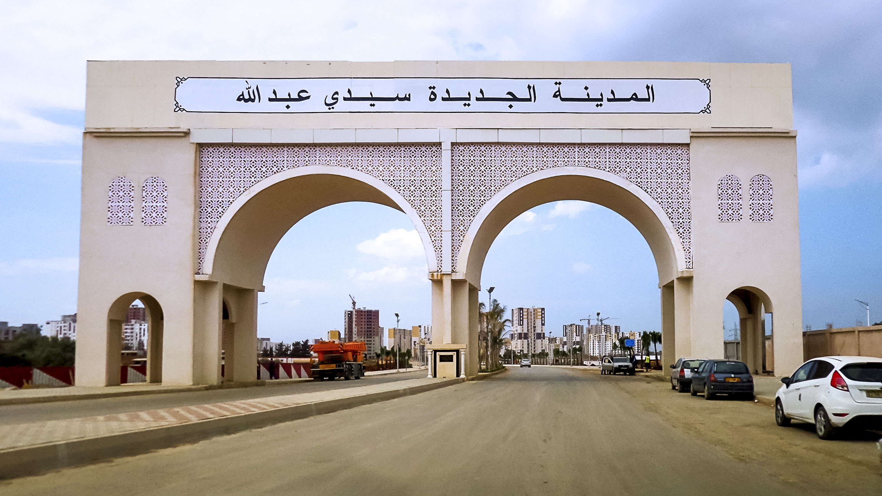 Nouvelle ville Sidi Abdellah المدينة الجديدة سيدي عبد الله